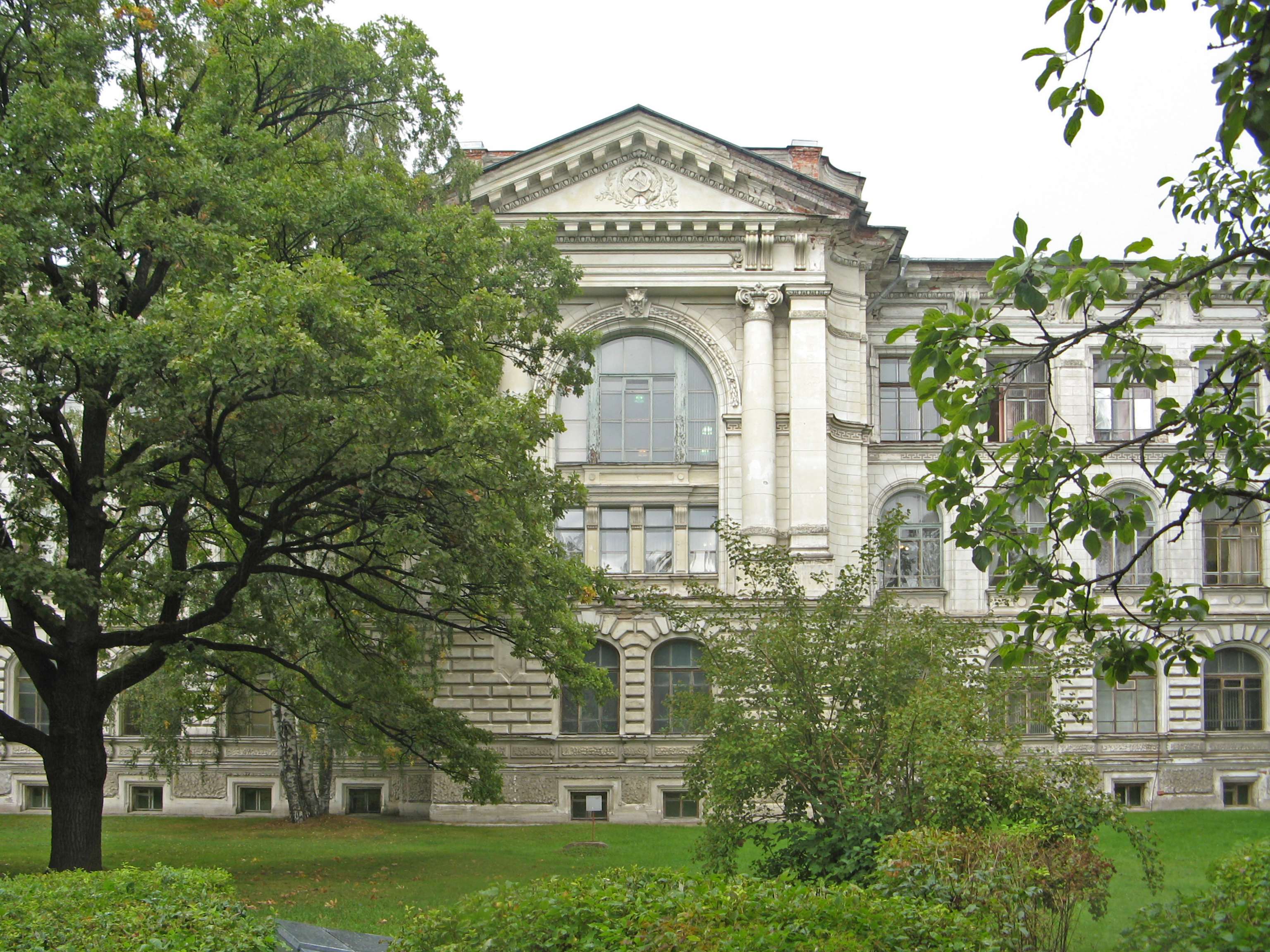 Политехнический институт. Главное здание: улица Политехническая, 29, Калининский район, Санкт-Петербург